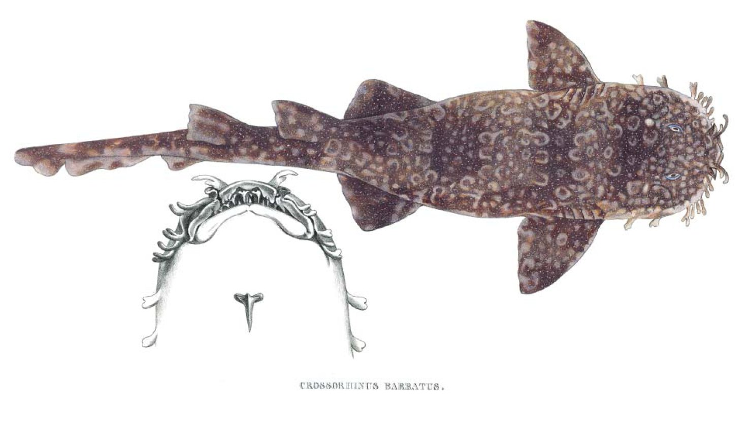 Старинное изображение пятнистого воббегонга как Crossorhinus barbatus (1841)